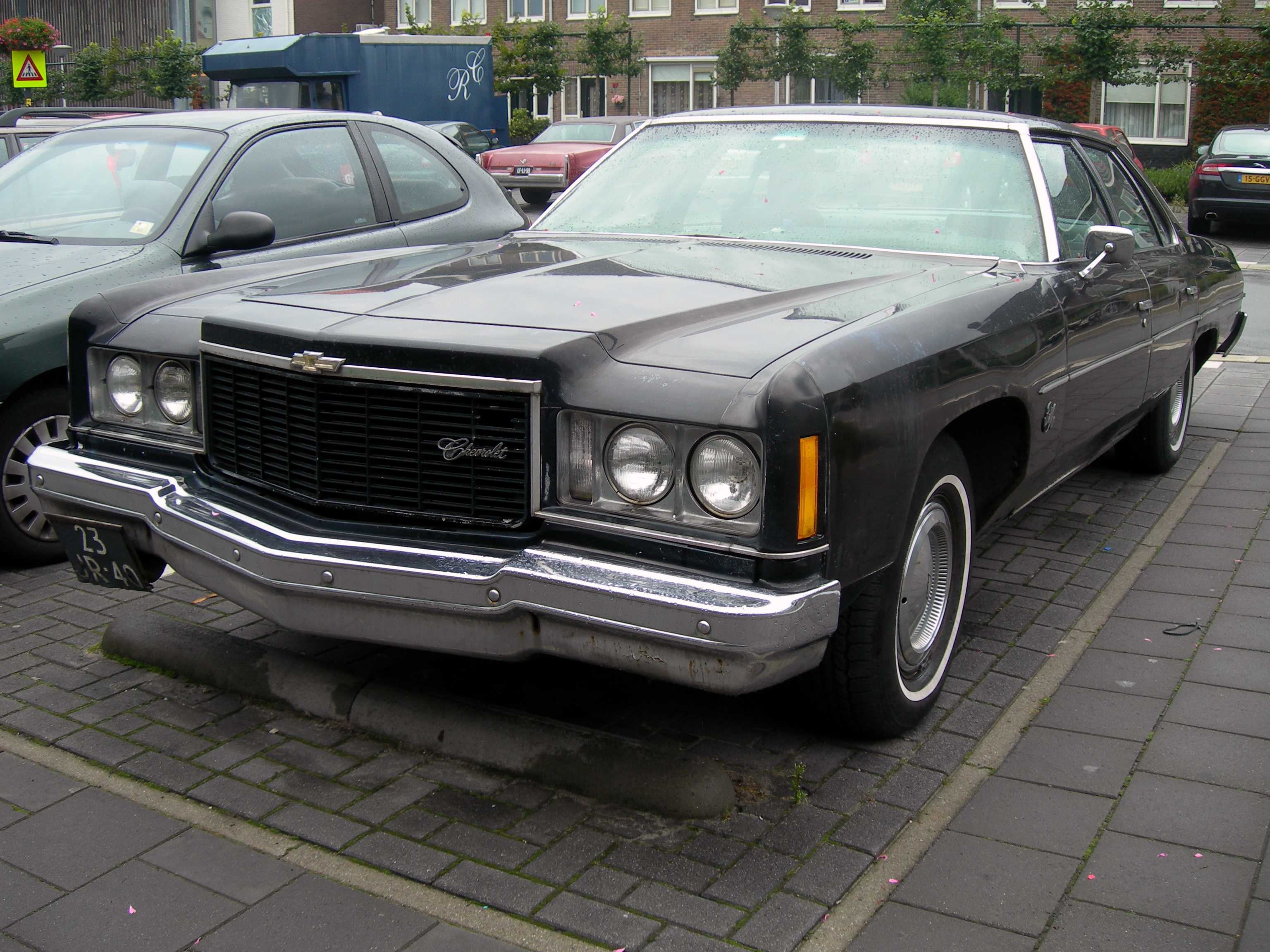 Eindhoven,Aug 2010